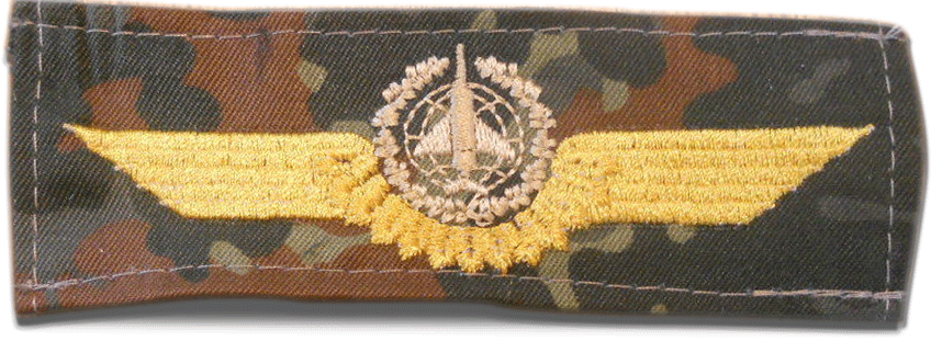 Tätigkeitsabzeichen für Kampfbeobachter (Waffensystemoffizier) der Bundeswehr in Textil Voraussetzungen: Stufe I, Bronze: Besitz des Militärluftfahrzeugbesatzungsscheins (MBS) und abgeschlossene Ausbildung zum Kampfbeobachter (Waffensystemoffizier) oder Luftfahrzeugoperationsoffizier. Stufe II, Silber: Wie Stufe I und 1200 Flugstunden. Stufe III, Gold: Wie Stufe I und 1800 Flugstunden. Anmerkung: Als Flugstunden angerechnet wird die gesamte Flugzeit als Luftfahrzeugbesatzungsangehörige einschließlich der Ausbildung. Ausführung: Stilisierter Globus mit Flugzeug im Eichenlaubkranz in Doppelschwinge mit unterem Federkranz, bronze-, silber- oder goldfarben.